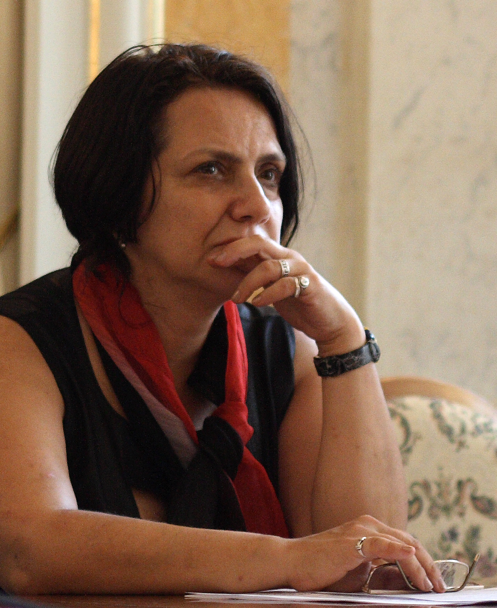 Кононенко Євгенія (народилася 17 лютого 1959 року в Києві, УРСР) - українська письменниця, лавреатка всеукраїнських премій, перекладачка.